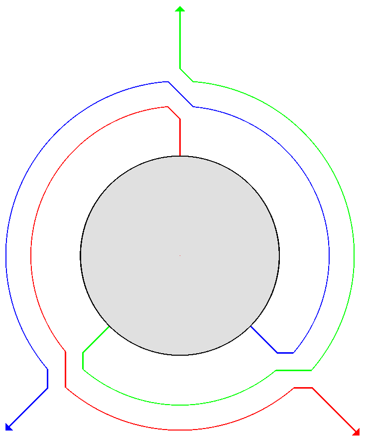 Baumknoten bei Wirbeltraversierung (zweimal besucht)